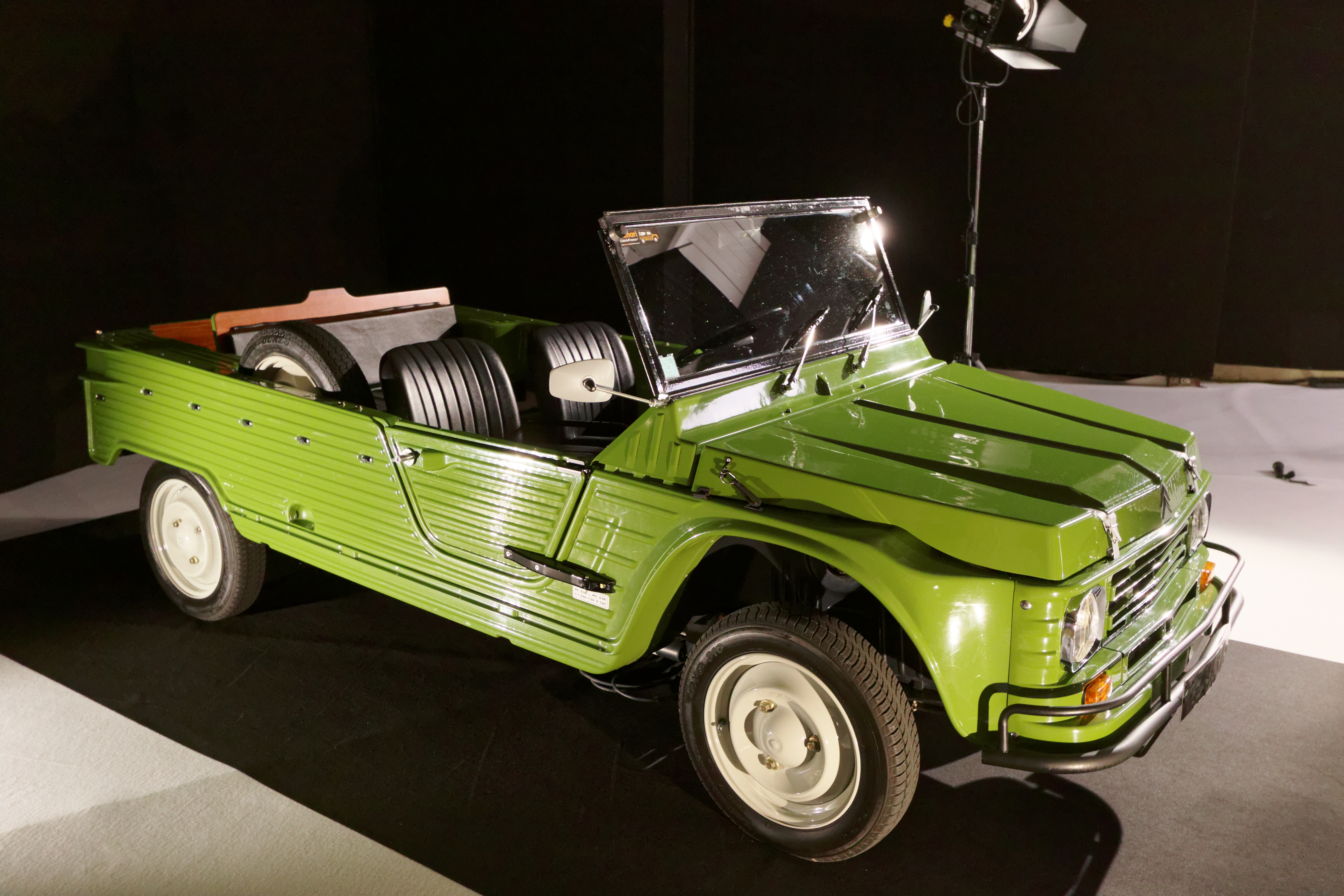 Une Citroën Mehari de 1982 présentée lors du mondial de l'automobile de Paris 2016. Cette voiture a peut-être été utilisée sur le tournage du film le gendarme et les gendarmettes.